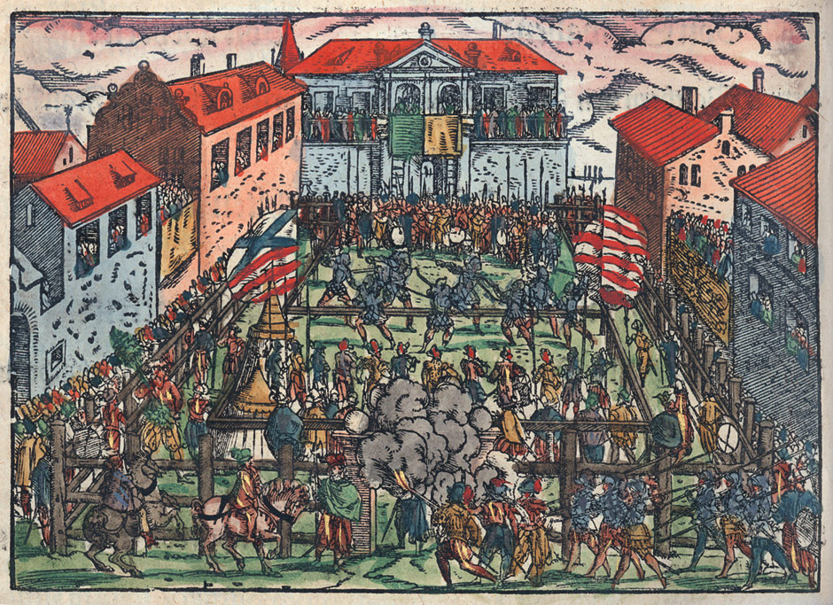 Colorized woodcut from: (Rüxner, Georg). Thurnierbuch, das ist, Warhaffte, eigentliche, vnd kurtze Beschreibung von Anfang, Vrsachen, Vrsprung, vnd Herkommen der Thurnier im Heyligen Romischen Reich Teutscher Nation, wie viel offentlicher Landthurnier von Keyser Heinrichen dem Ersten dieses Namens an biss auff Keyser Maximilian den Andern ... vnd in welchen Statten die alle gehalten, auch durch welche Fursten, Graffen, Herrn, Ritter, vnd vom Adel dieselben jeder Zeit besucht worden, Frankfurt am Main, Reffeler für Feyerabend, 1578-79